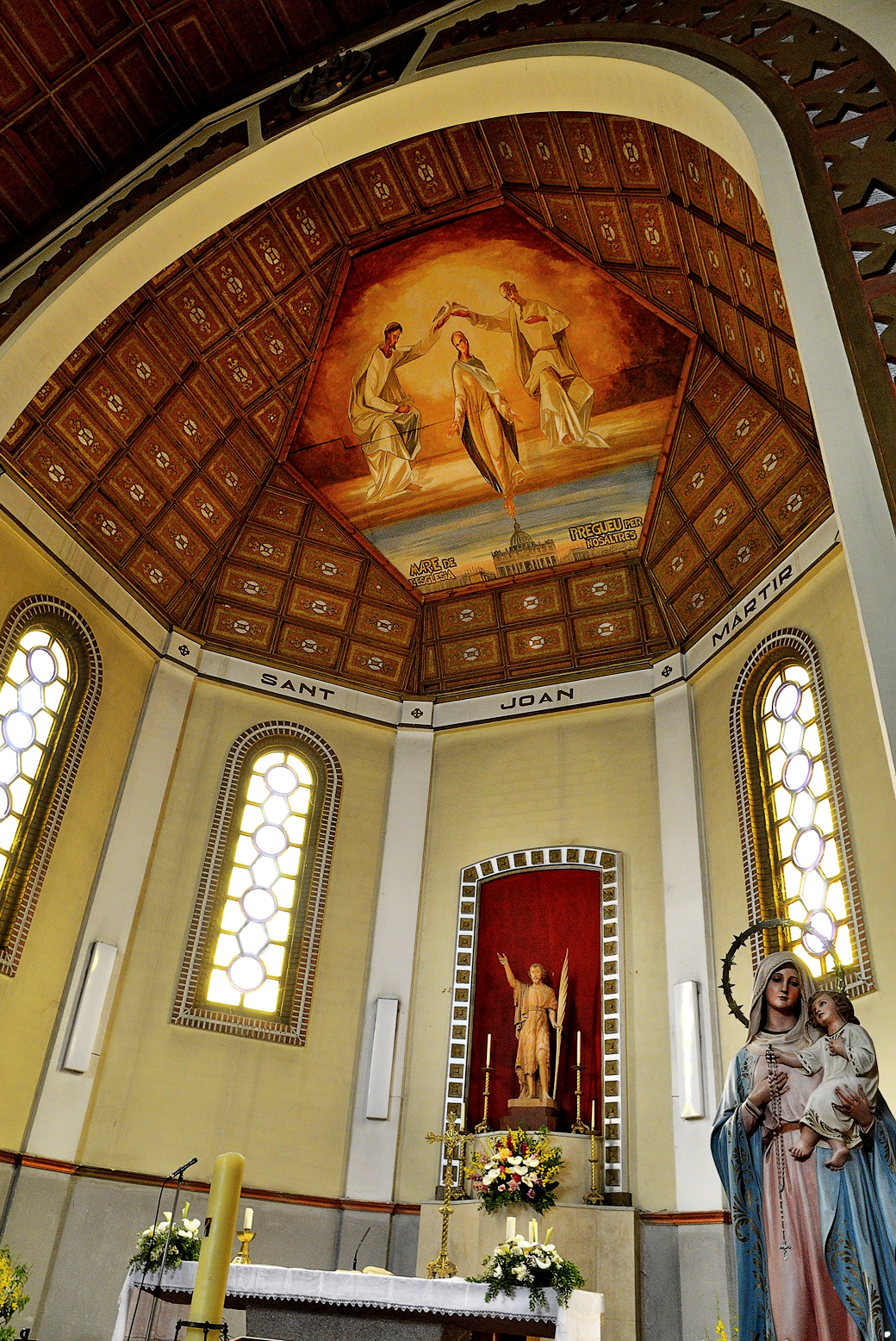 Altar de la Iglesia de Sant Joan Baptista, patró del poble de Penelles (Lleida)